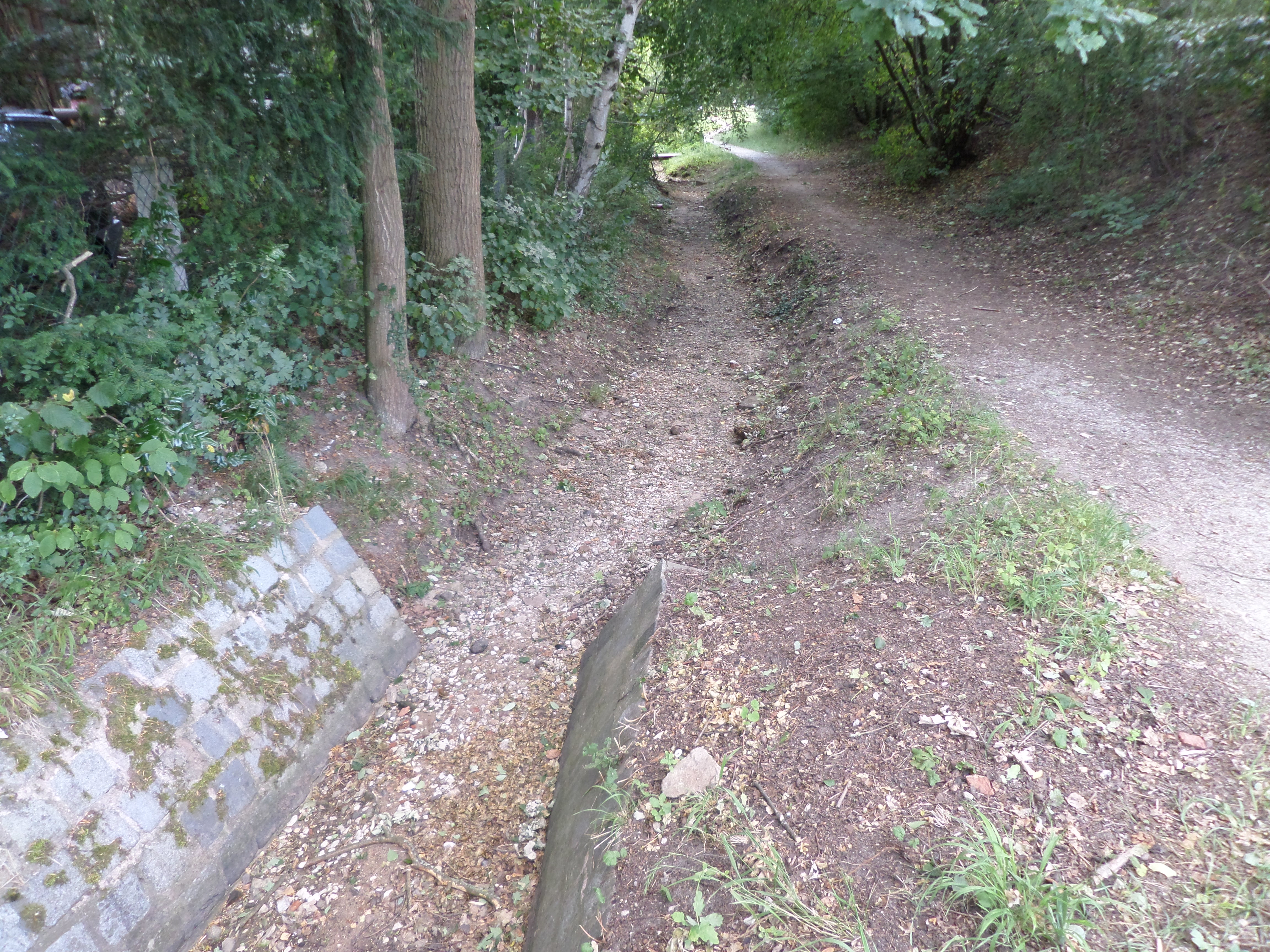 Hirschsprunggraben an der Hofer Str. Juli 2015